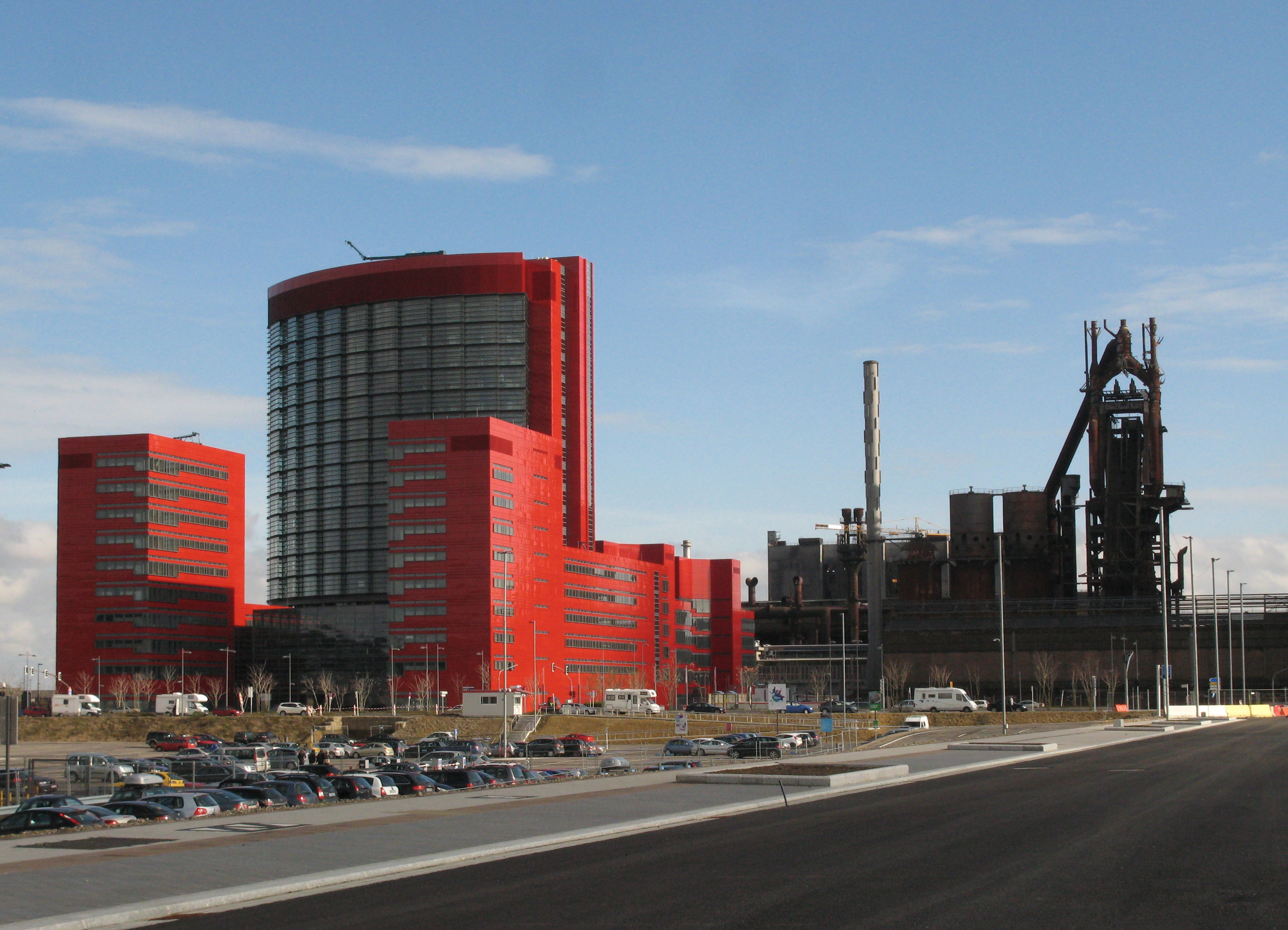 Bâtiment Dexia à Belval (Esch-sur-Alzette, Luxembourg)